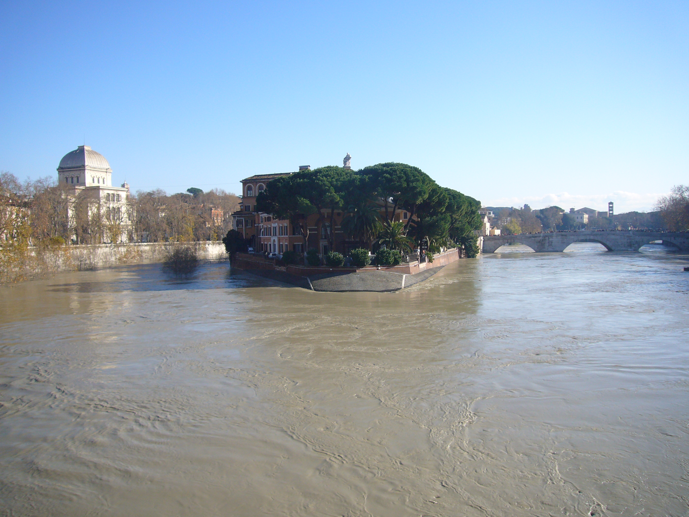 Roma, piena del Tevere all'Isola Tiberina il 13 dic. 2008 alle 11,30